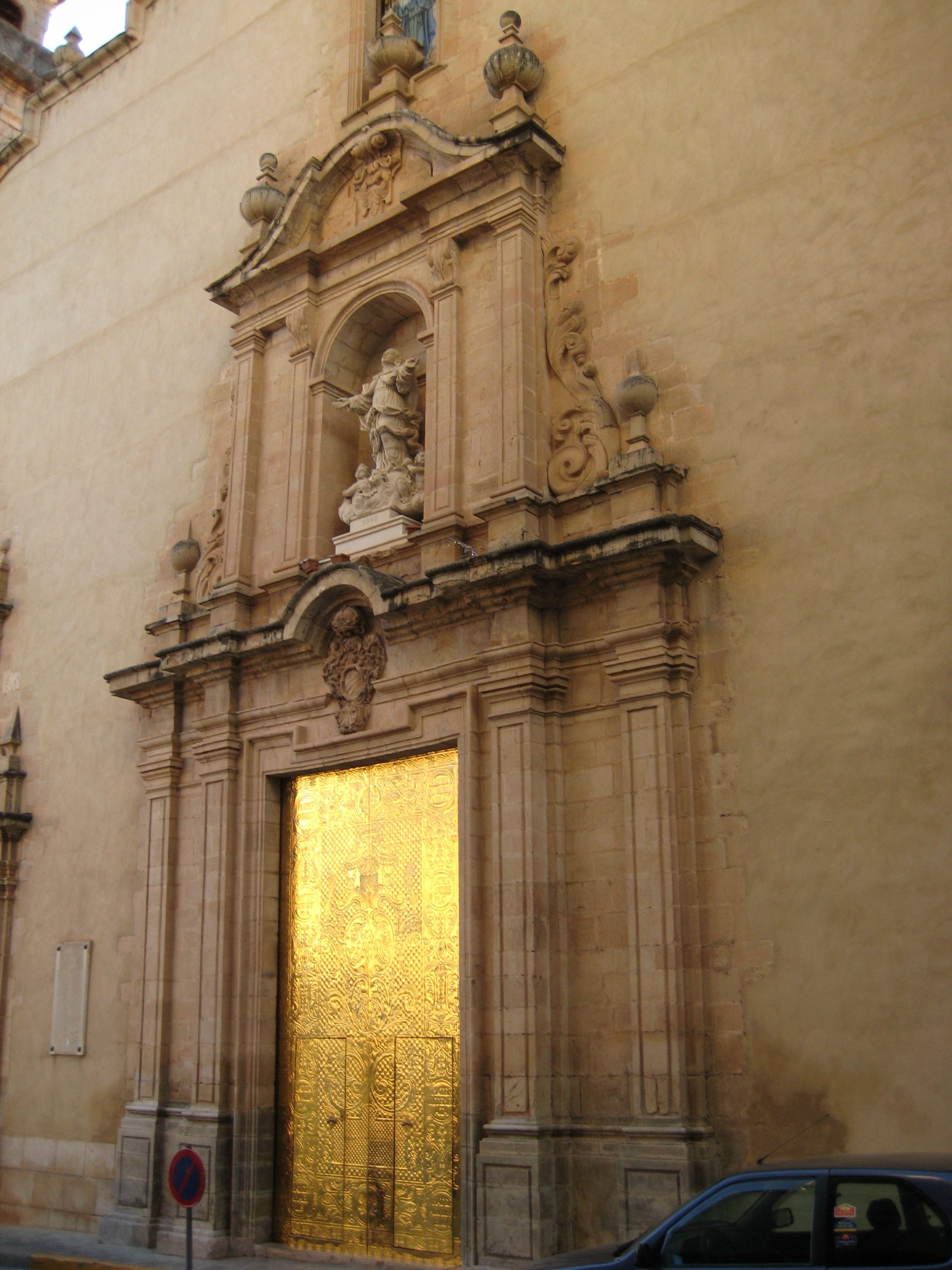 Portada central de l'església de l'Assumpció de Llucena (L'Alcalatén)